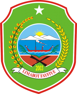 Lambang Kabupaten Halmahera Timur